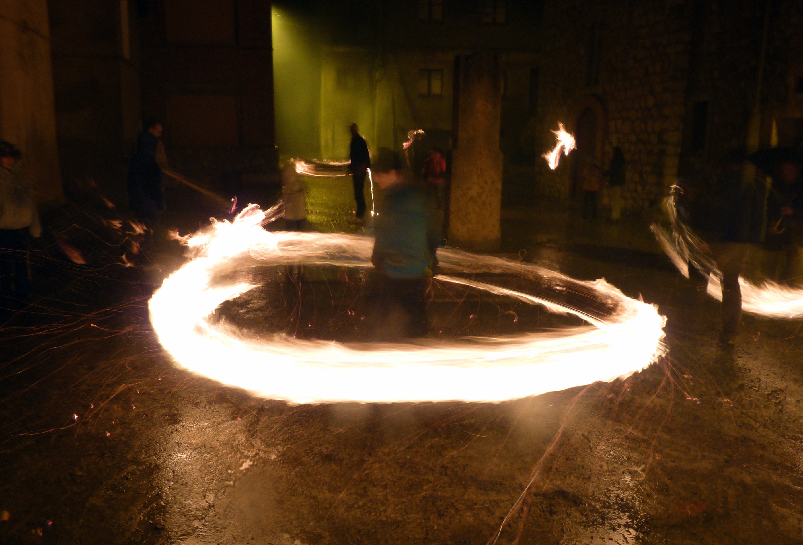 Fia faia de Sant Julià de Cerdanyola (Berguedà) el 24 de Desembre de 2009